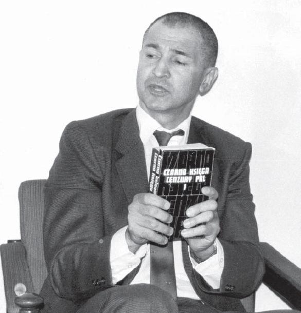 Czarna Księga Cenzury PRL w rękach Tomasza Strzyżewskiego.